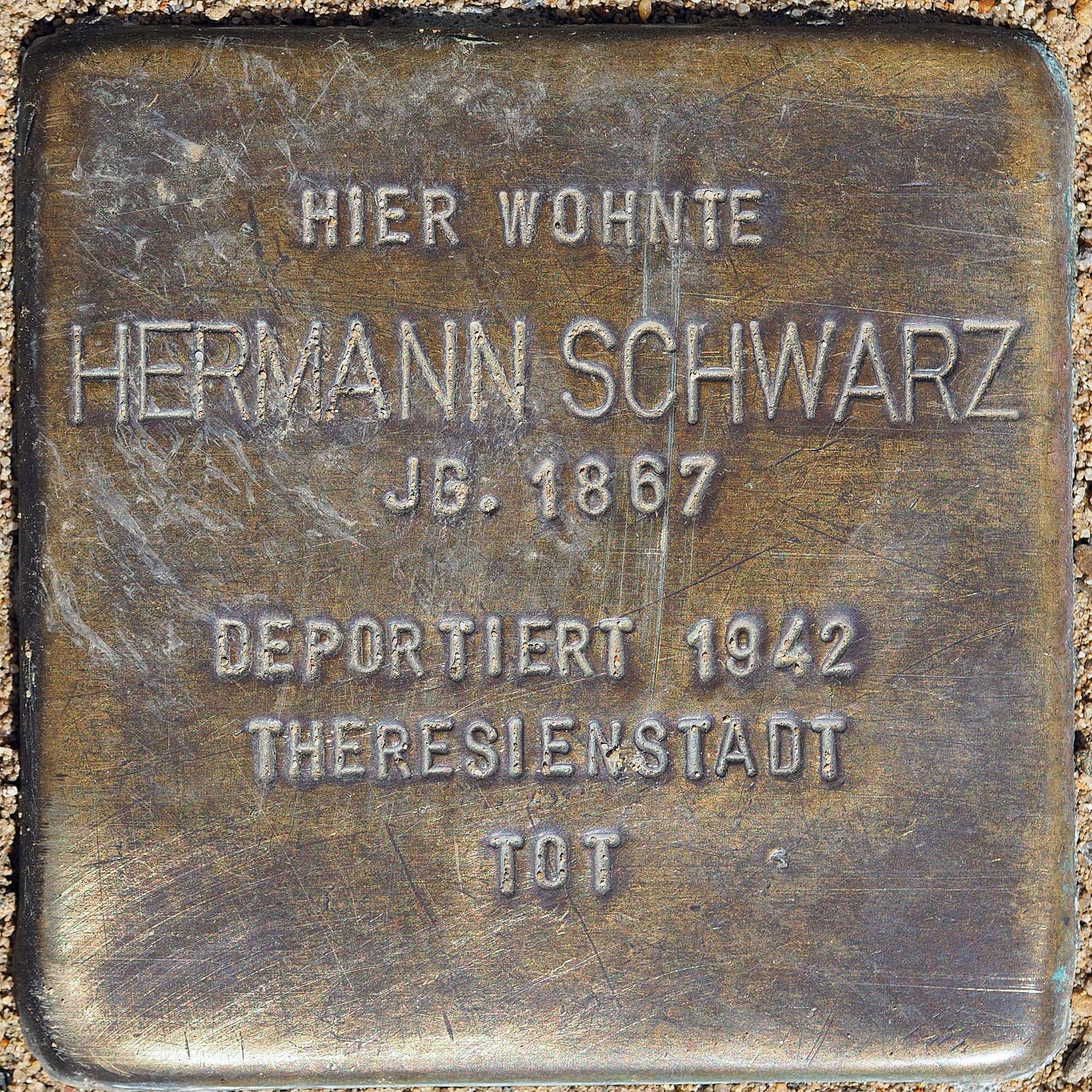 Stolpersteine Korschenbroich: Schwarz, Hermann